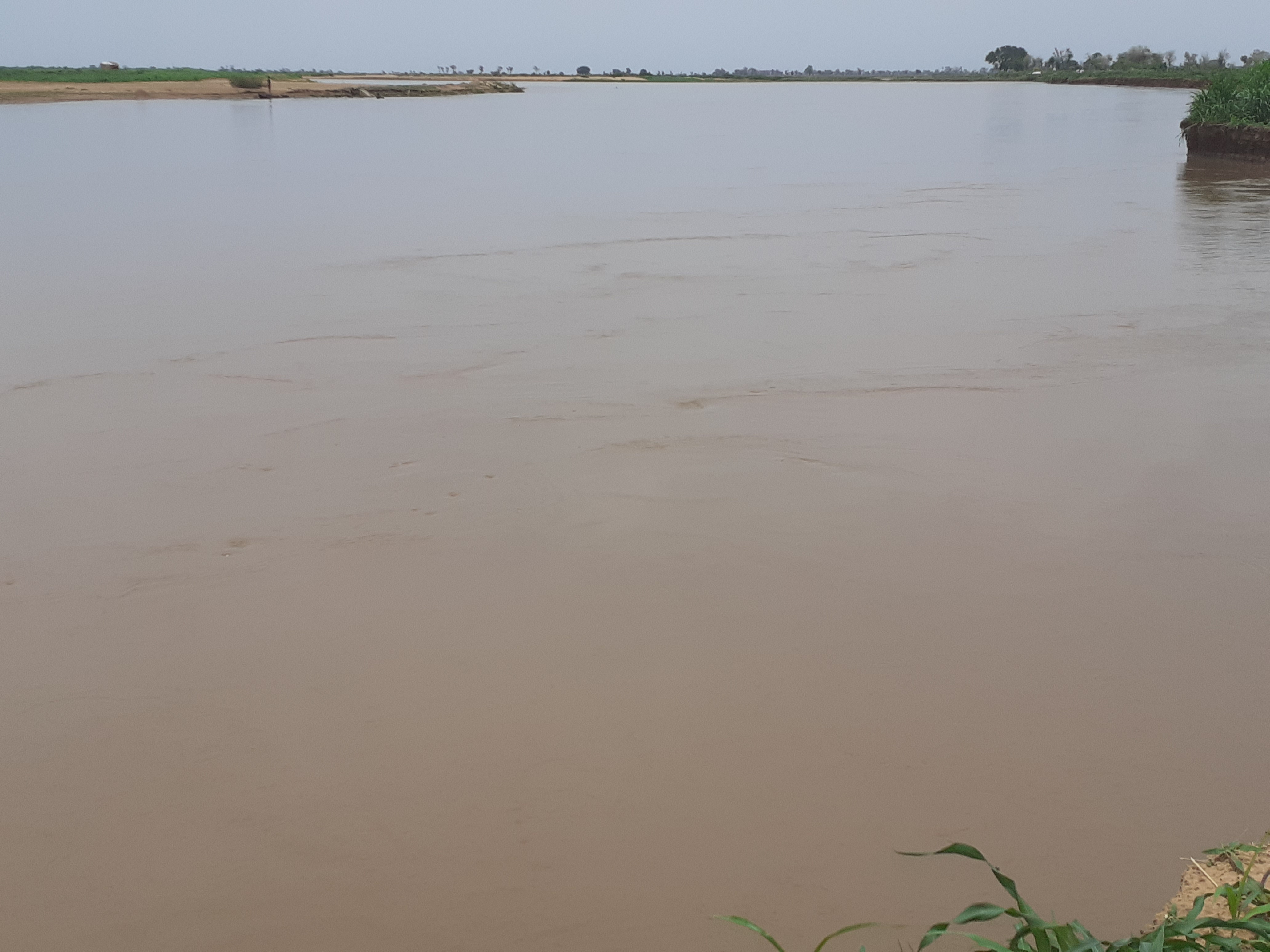 Les deux rives frontalières naturelles Cameroun Tchad depuis Bidim Cameroun. Vue de droite.